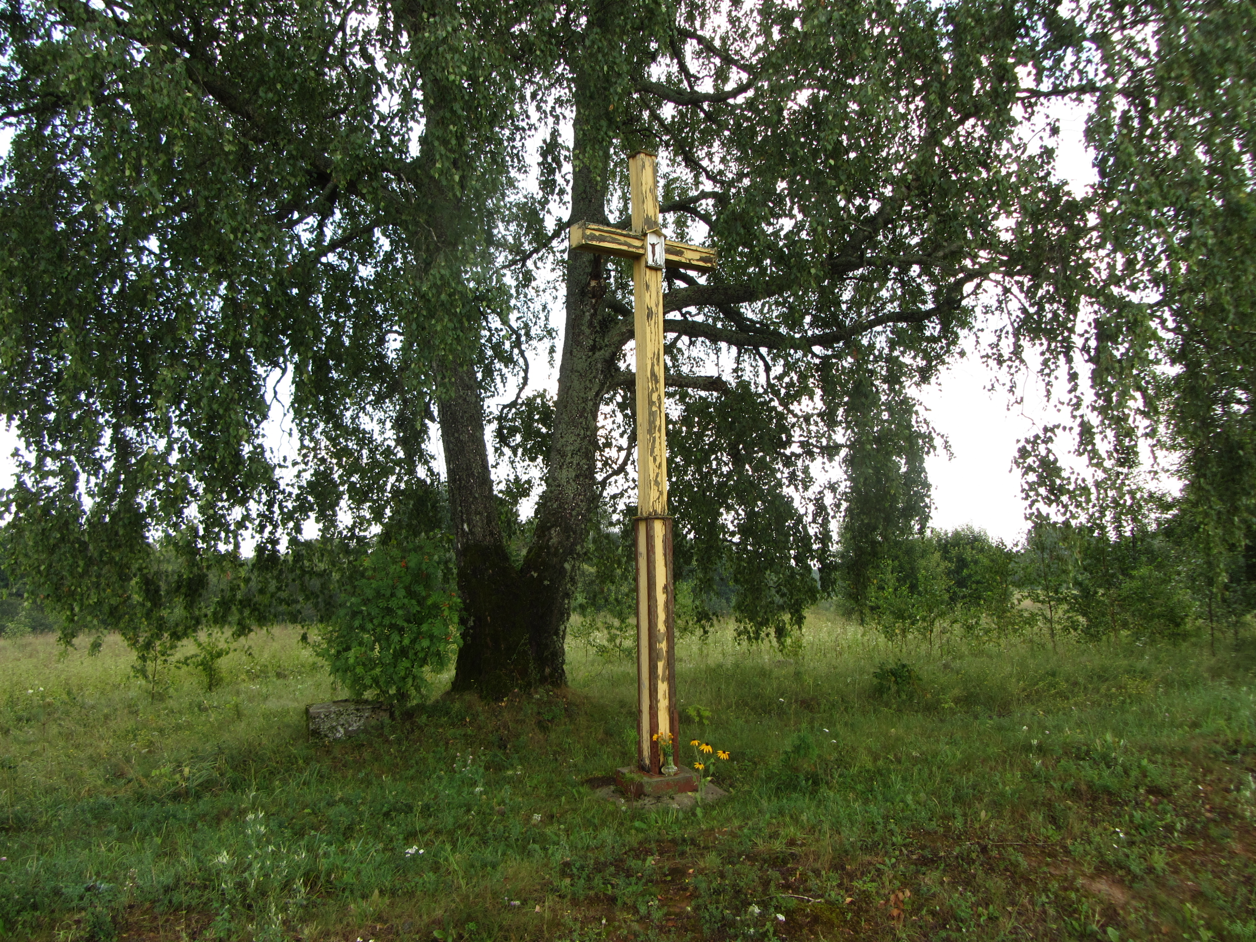 Joniškio sen., Lithuania